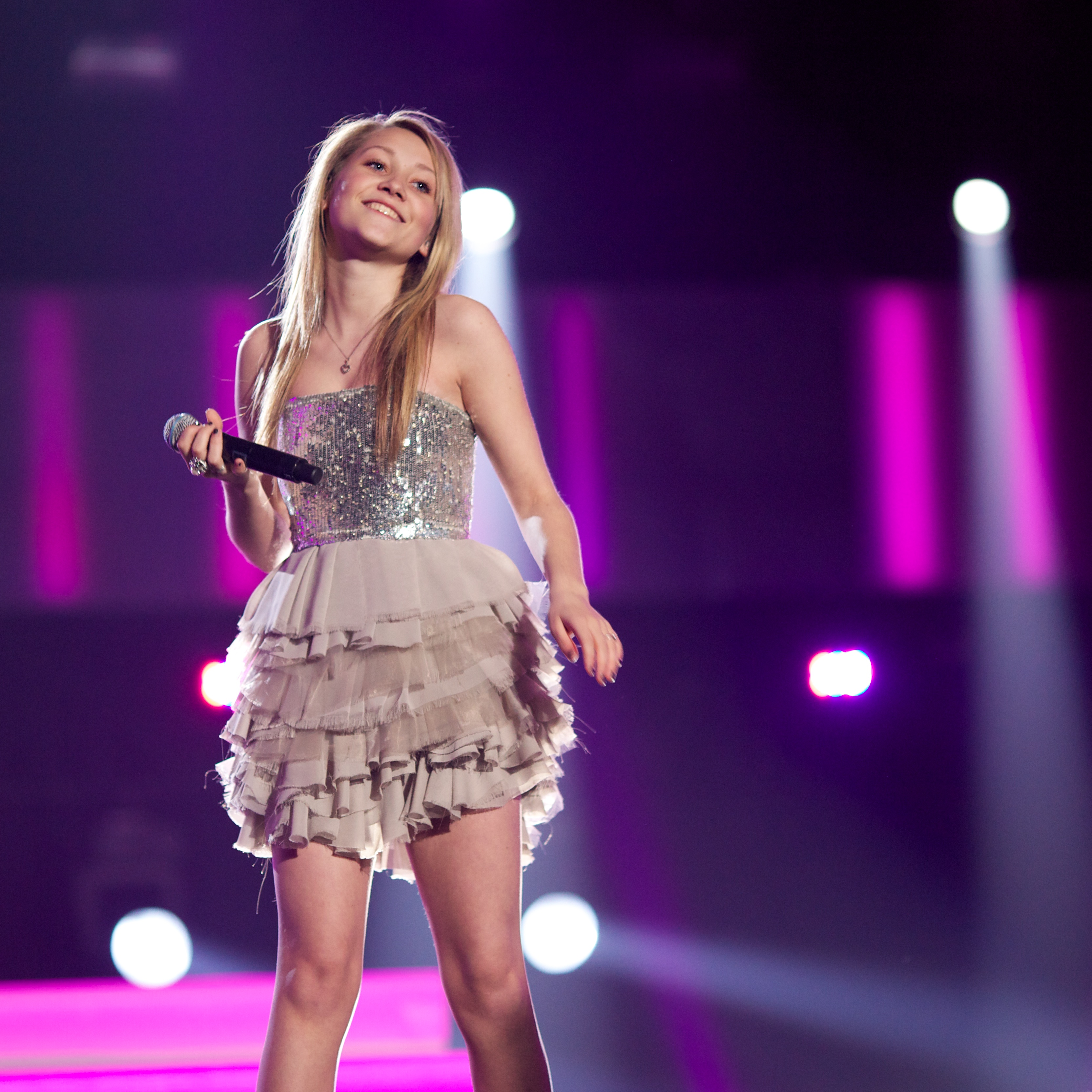 MGP 2012 delfinale i Larvik